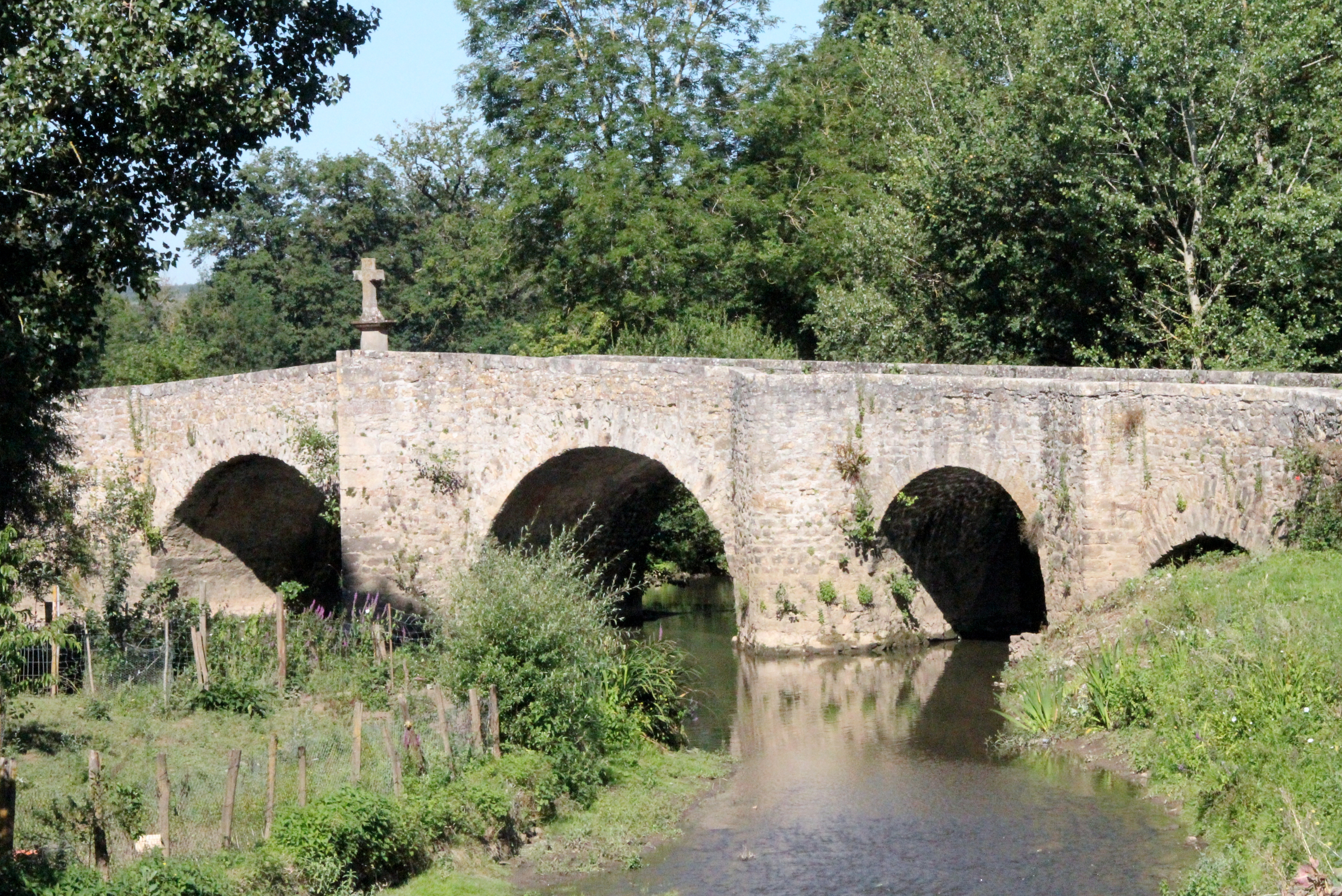 Sur l'aveyron, au pied du château